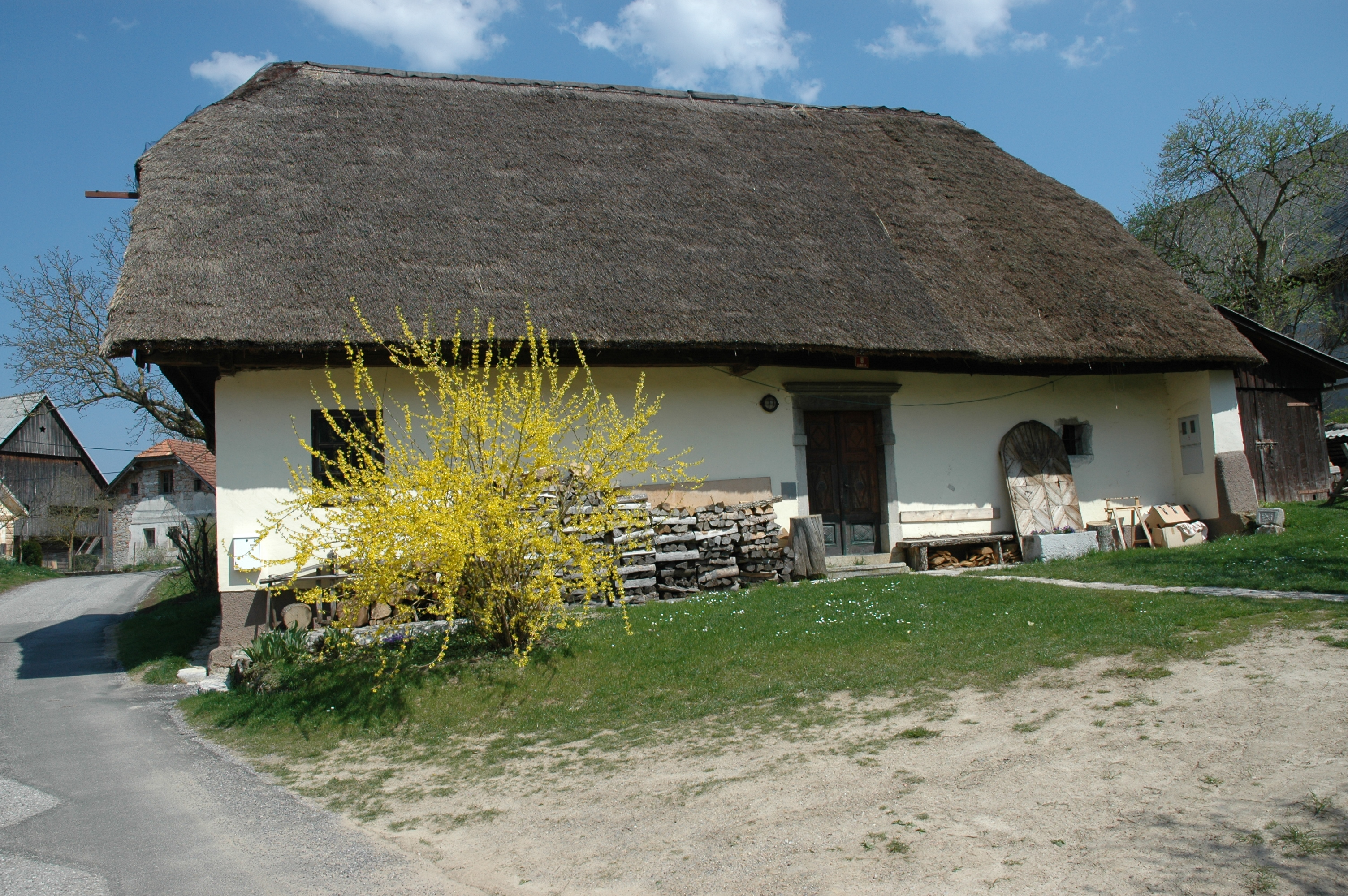 Foto Alenka Veber, domačija pri Češnjevcu na Goričicah